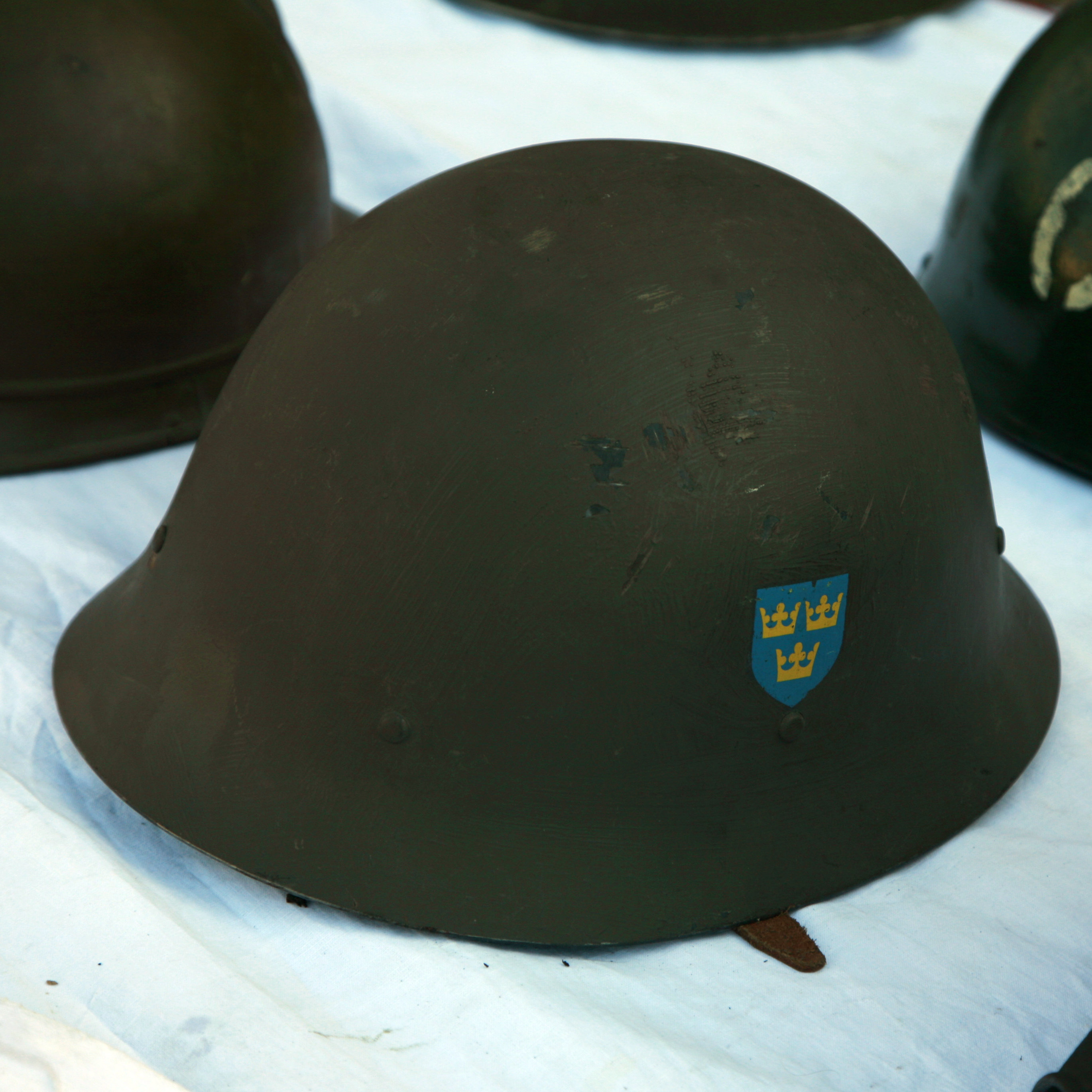 Hjälm 26